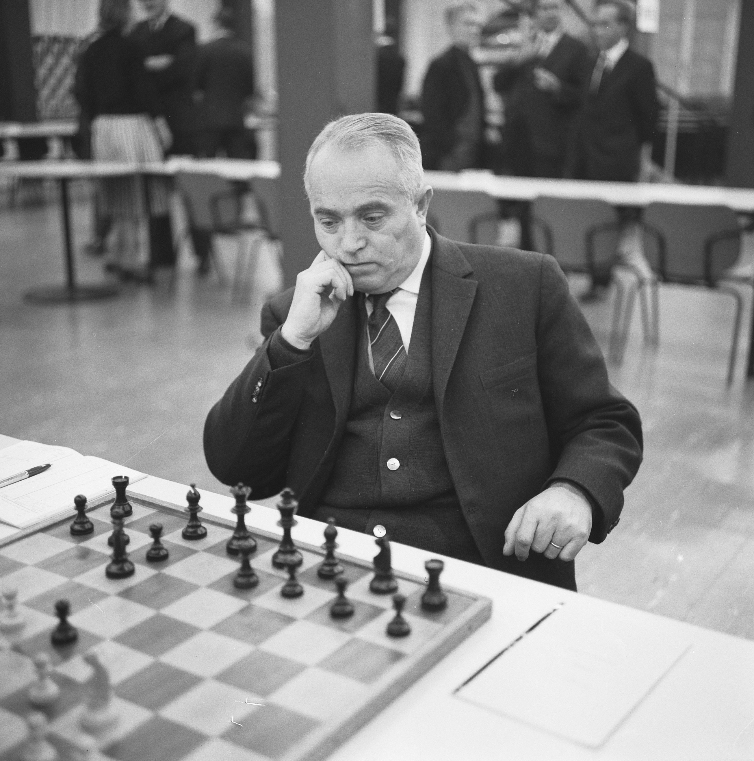 Collectie / Archief : Fotocollectie Anefo Reportage / Serie : [ onbekend ] Beschrijving : De GAK-zeskamp te Amsterdam. Salo Flohr Datum : 11 december 1963 Locatie : Amsterdam, Noord-Holland Trefwoorden : SCHAKEN Fotograaf : Broers, F.N. / Anefo Auteursrechthebbende : Nationaal Archief Materiaalsoort : Negatief (zwart/wit) Nummer archiefinventaris : bekijk toegang 2.24.01.03 Bestanddeelnummer : 915-8362